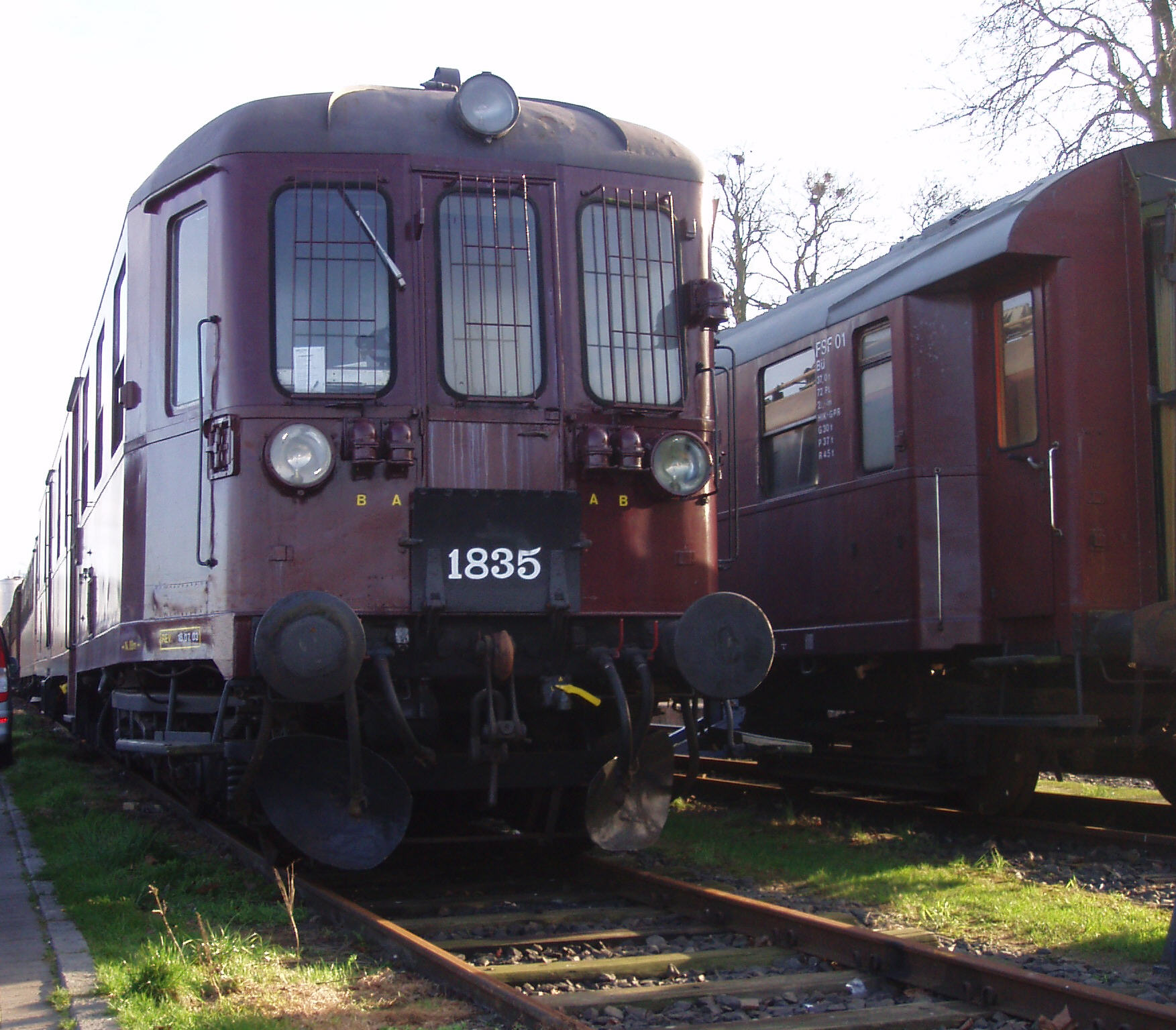 in Kappeln